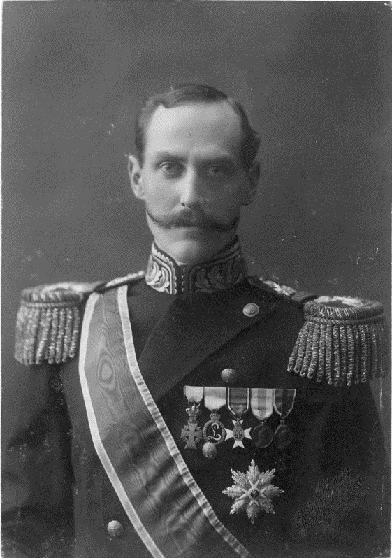 Haakon VII i 1906, portrett, mann, konge, uniform, ordener, ordensbånd, epåletter, brystbilde.